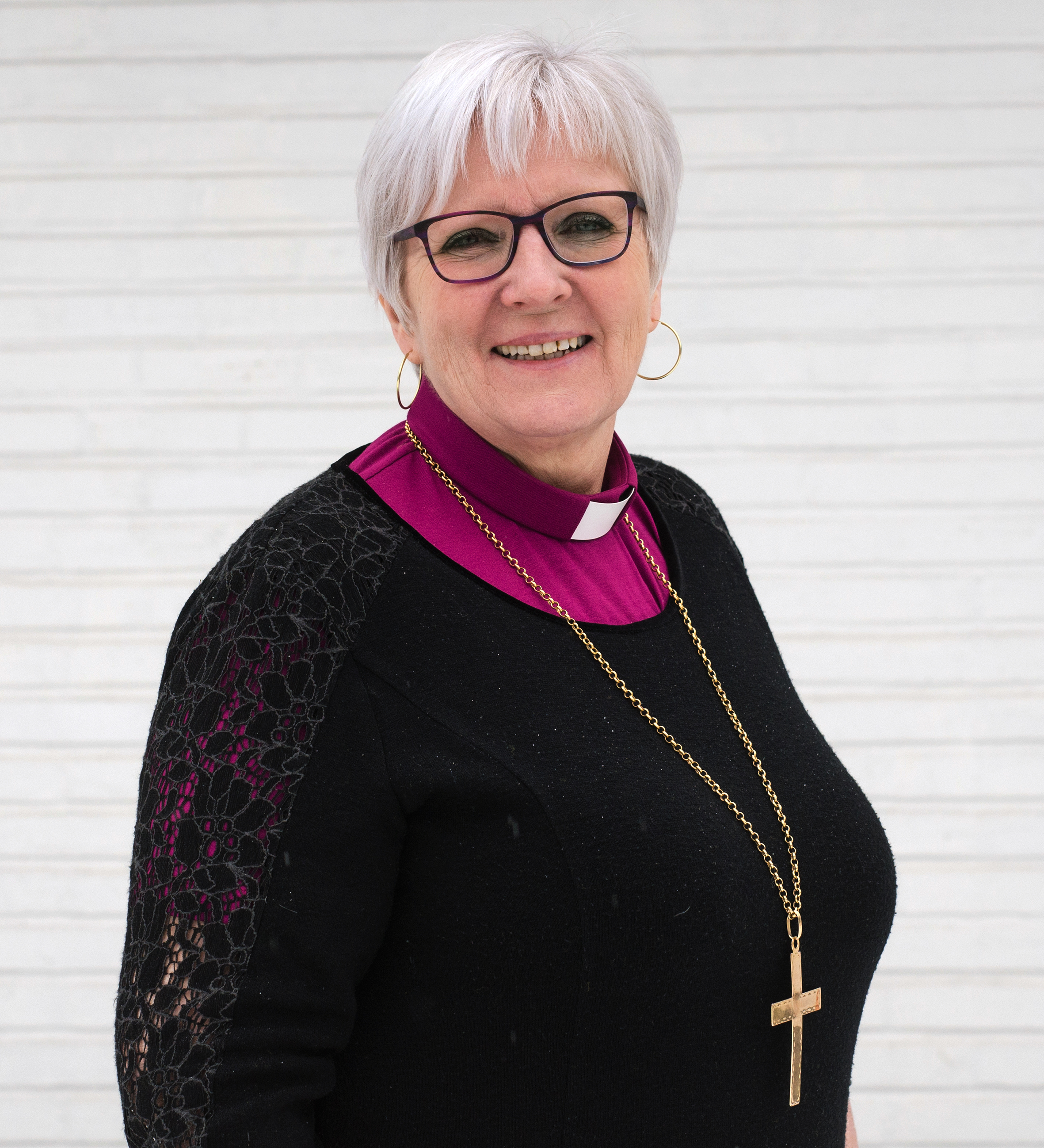 Biskop i Sør-Hålogaland bispedømme